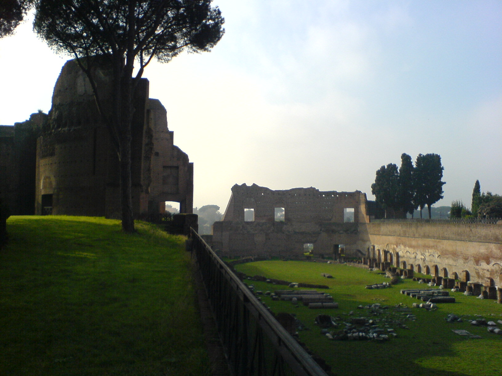 Palatijn in Rome